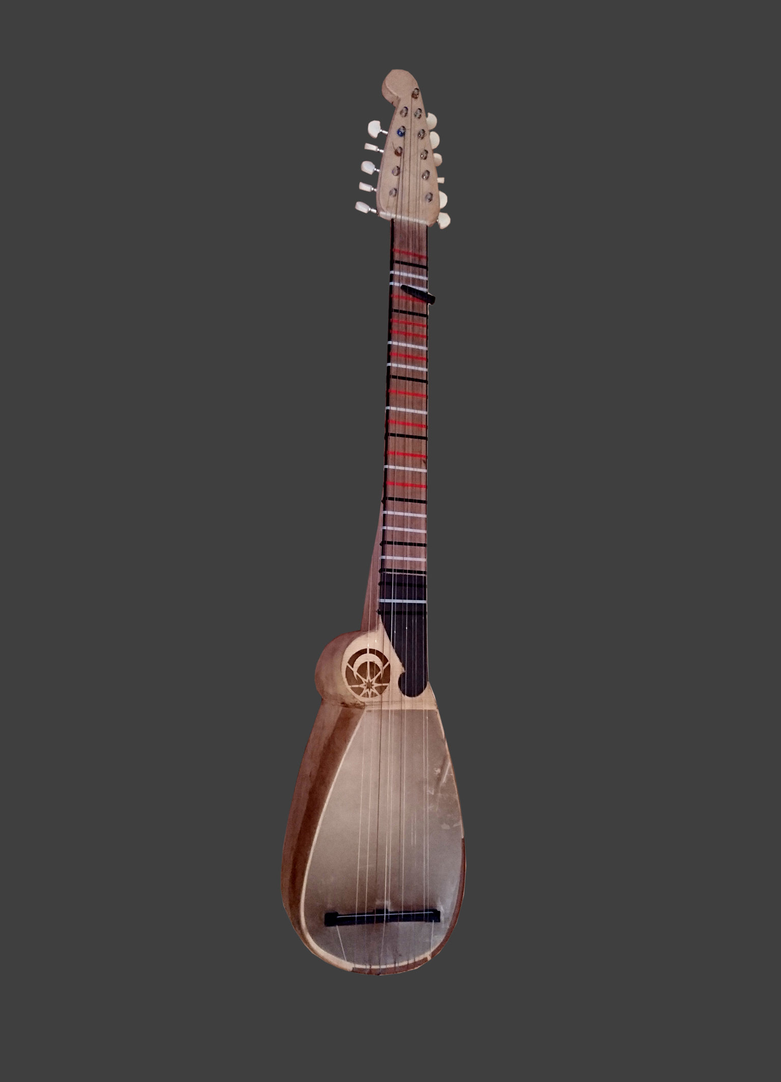 Azərbaycanın Milli mizrablı-simli musiqi aləti